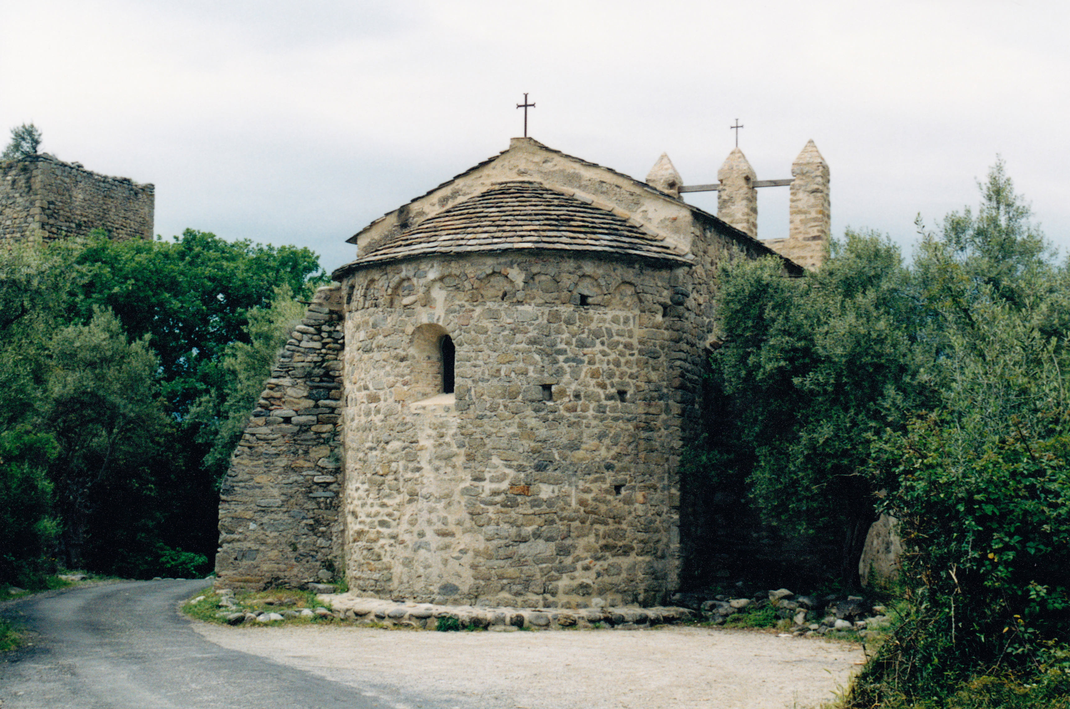 France - Pyrénées-Orientales - Ille-sur-Têt - Chapelle de Casenoves